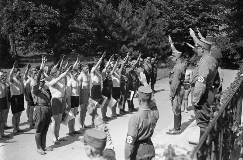 Harnekop: SA Führerschule: Ein Hoch auf den Führer